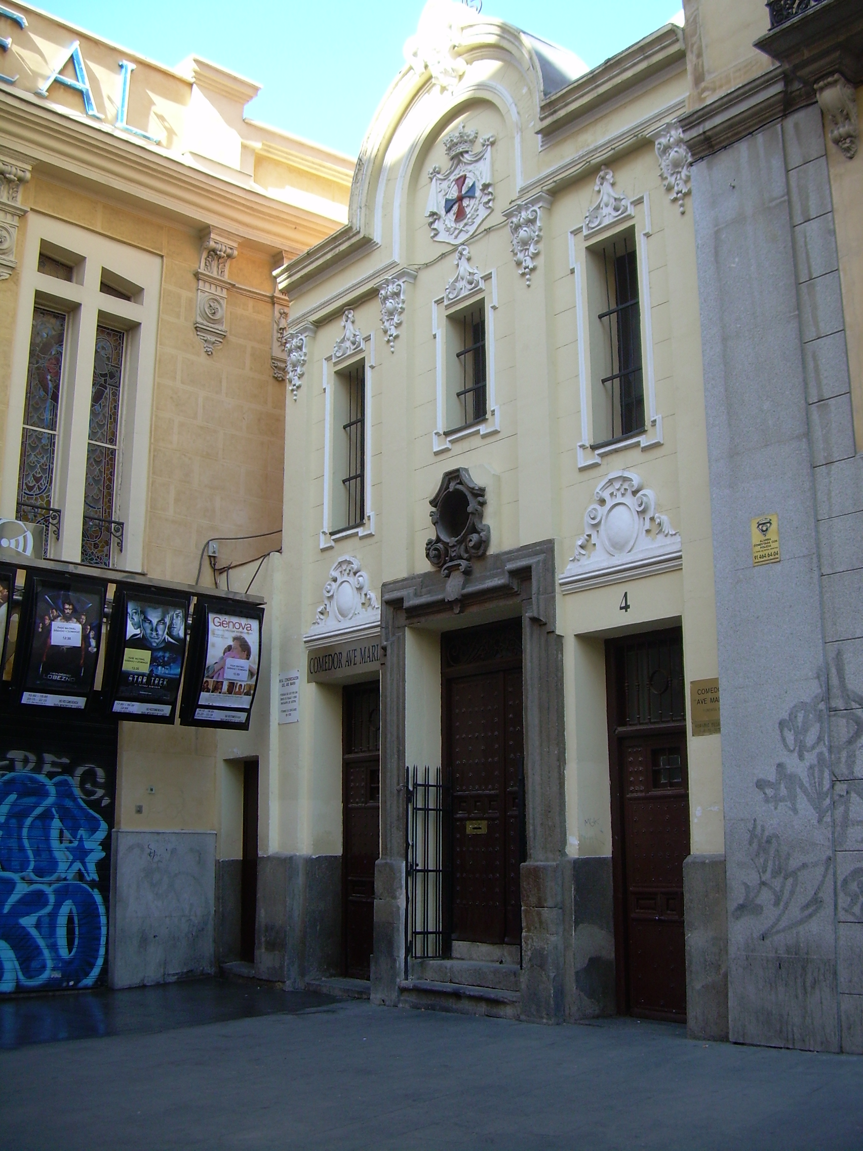 Capilla y comedor del Ave María, en Madrid, fundados por Simón de Rojas y la Congregación del Ave María, para la asistencia a necesitados